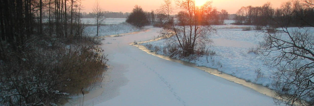 Daugyvienė ties Rozalimo miesteliu.